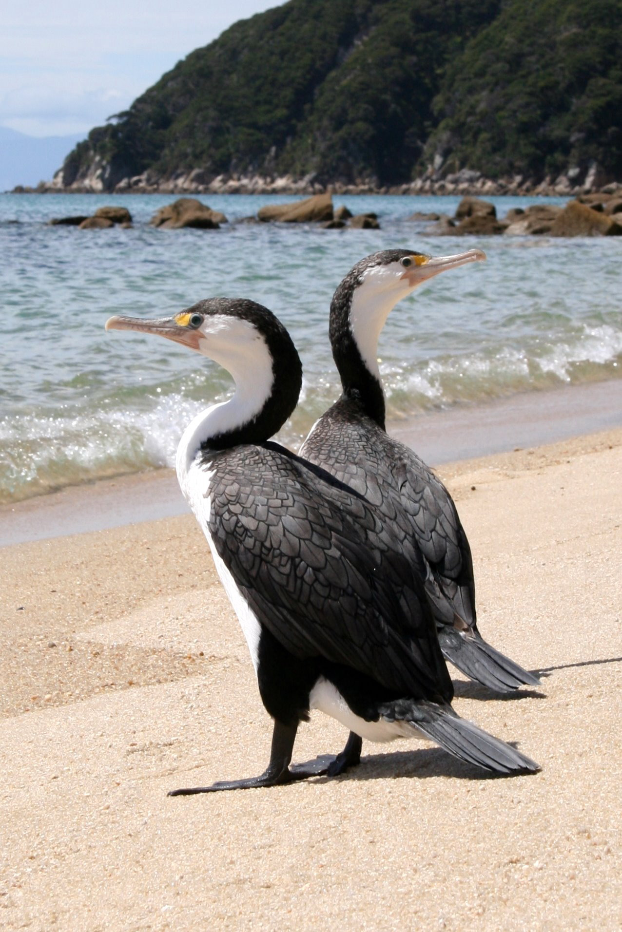 Pied Cormorant, Phalacrocorax varius.